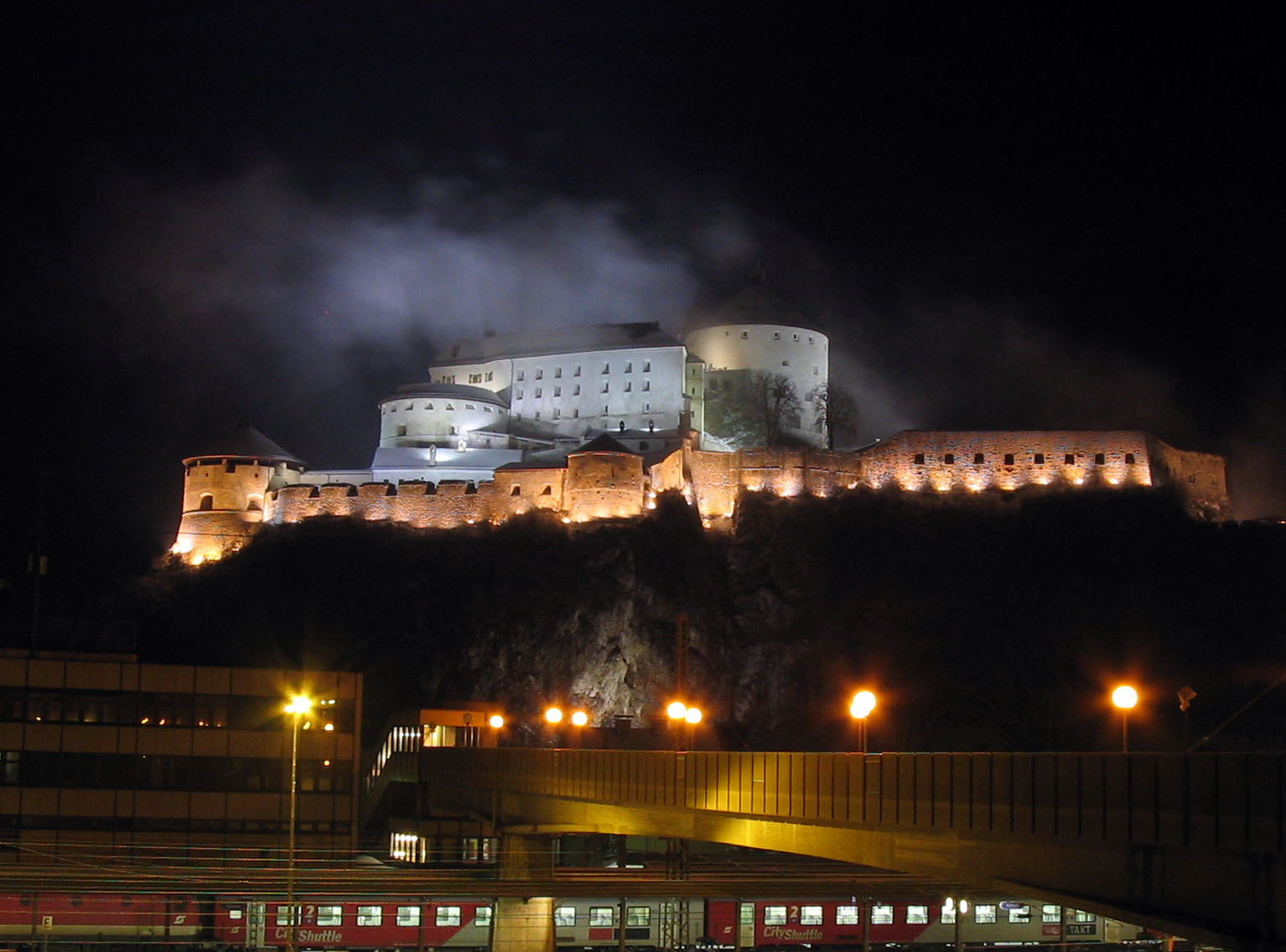 Festung Kufstein bei Nacht 23.01.2005